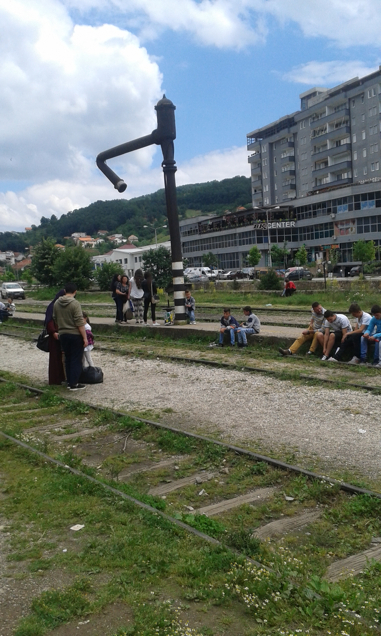 Der Bahnhof in Kacanik im Jahr 2017 kurz vor der Einfahrt eines Regionalzuges nach Fushe Kosova.